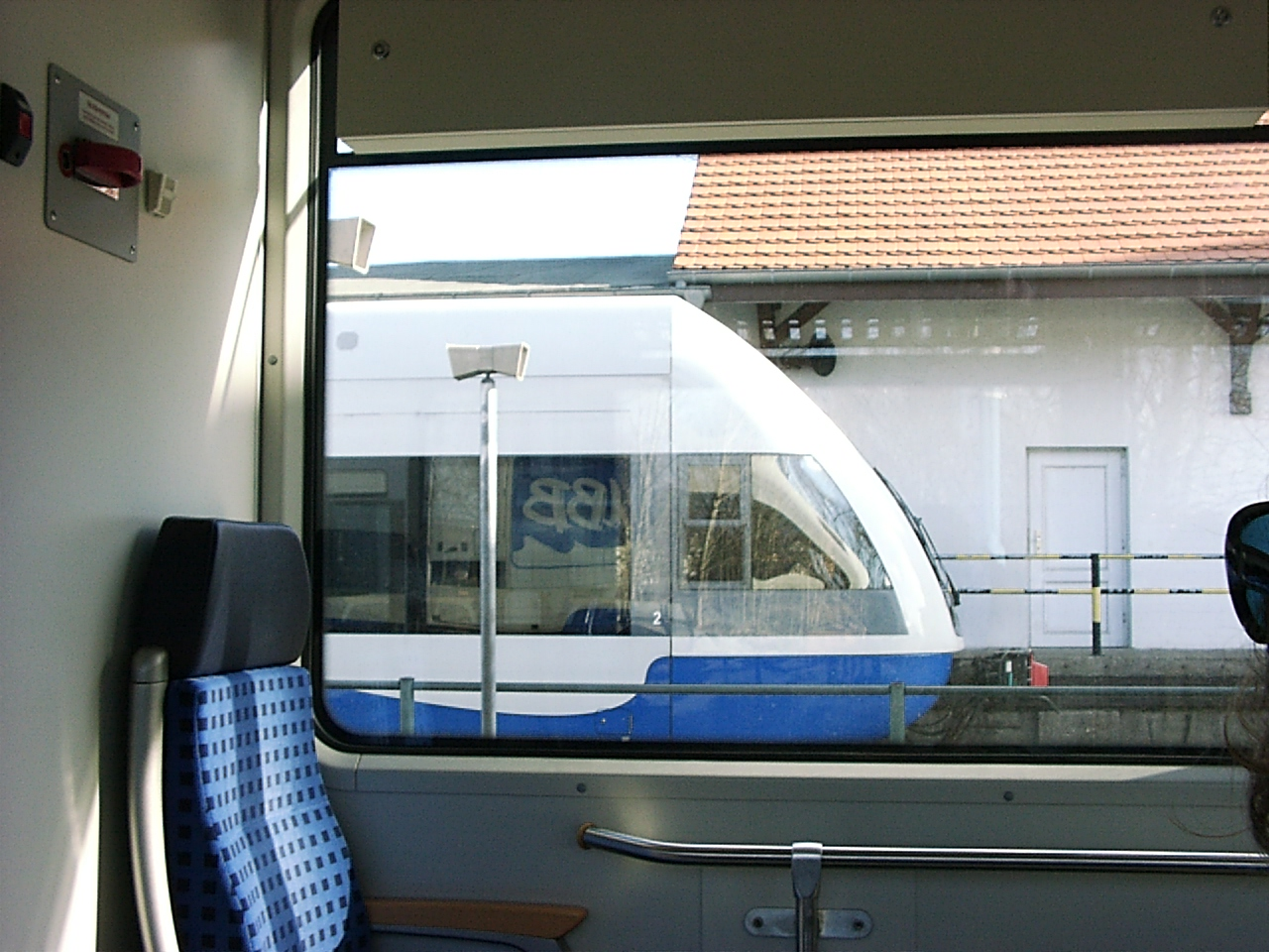 Usedomer Bäderbahn. Inneneinrichtung.